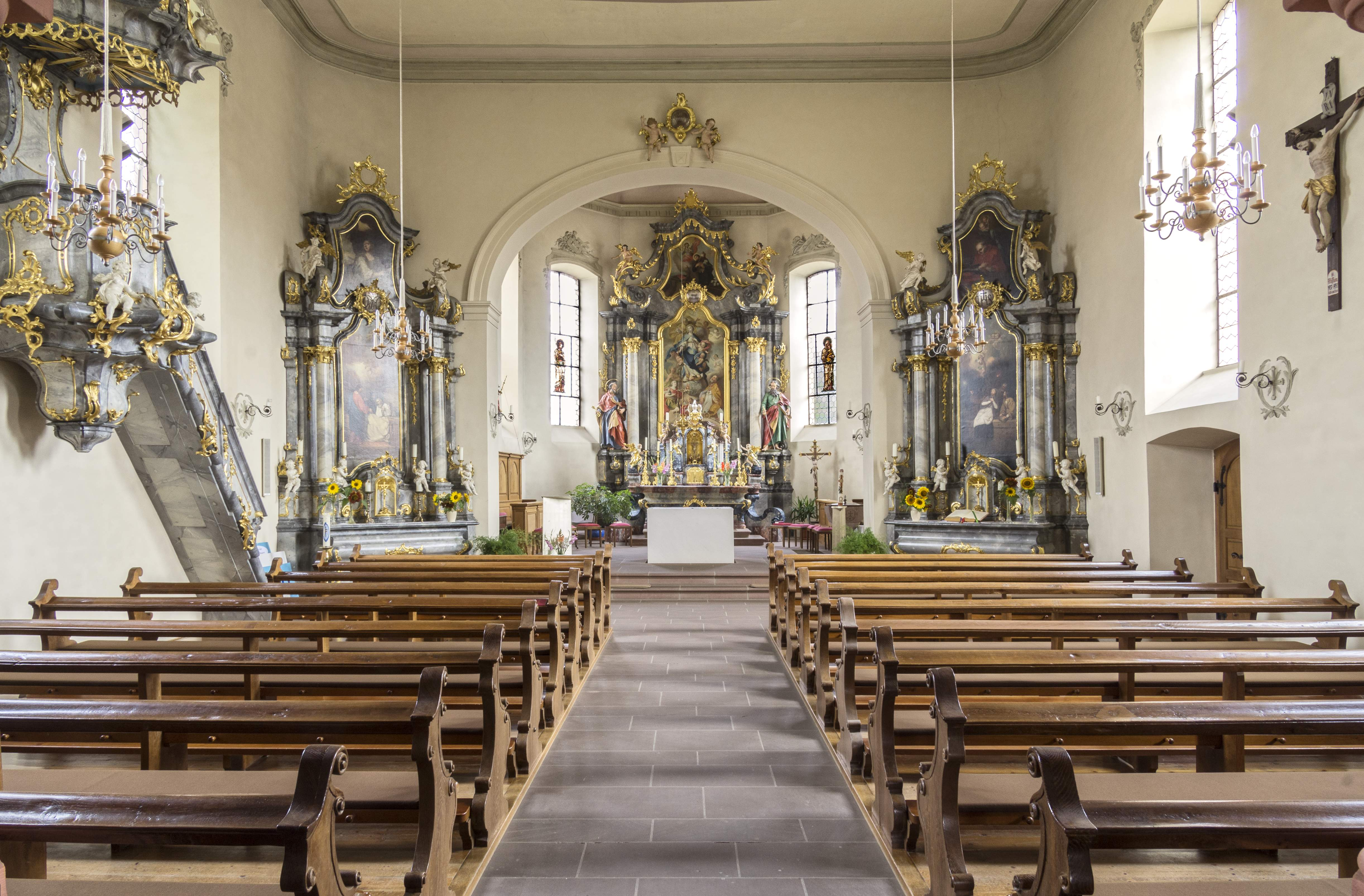 Die Katholische Pfarrkirche in March Holzhausen